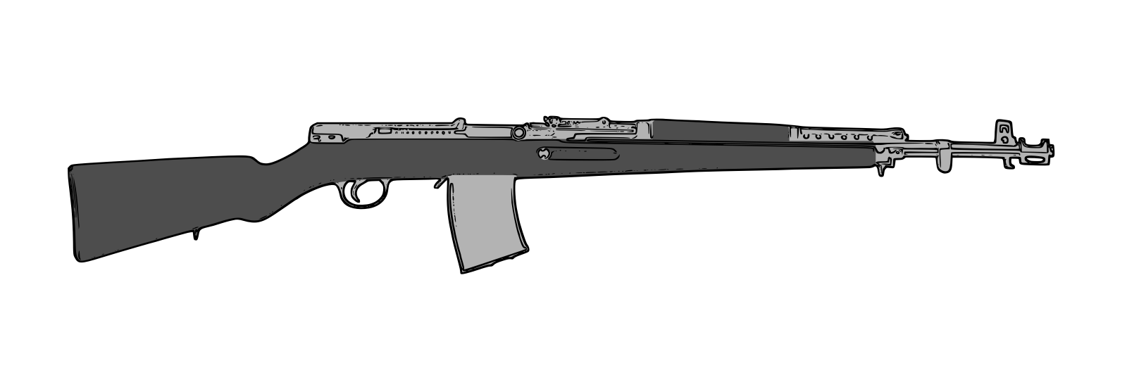 Soviet automatic rifle Simonov AVS-36